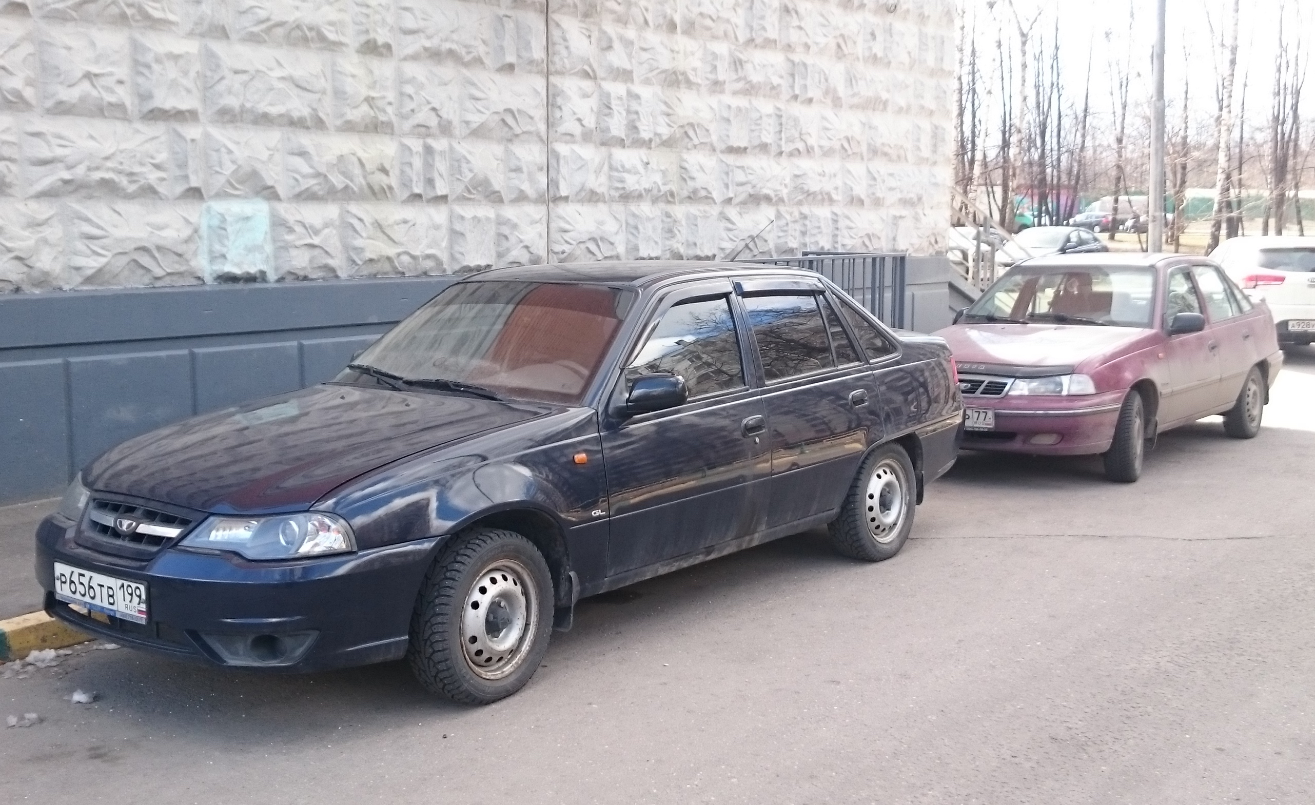 Daewoo Nexia pre and post facelift.